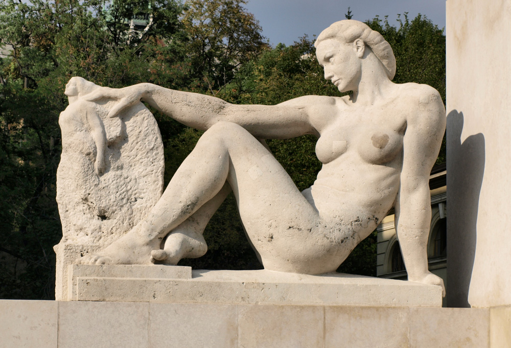 Klebelsberg Kunó szoborcsoport, nőalak (Budapest, XI. ker. Villányi út 25. – a templom és a gimnázium között)